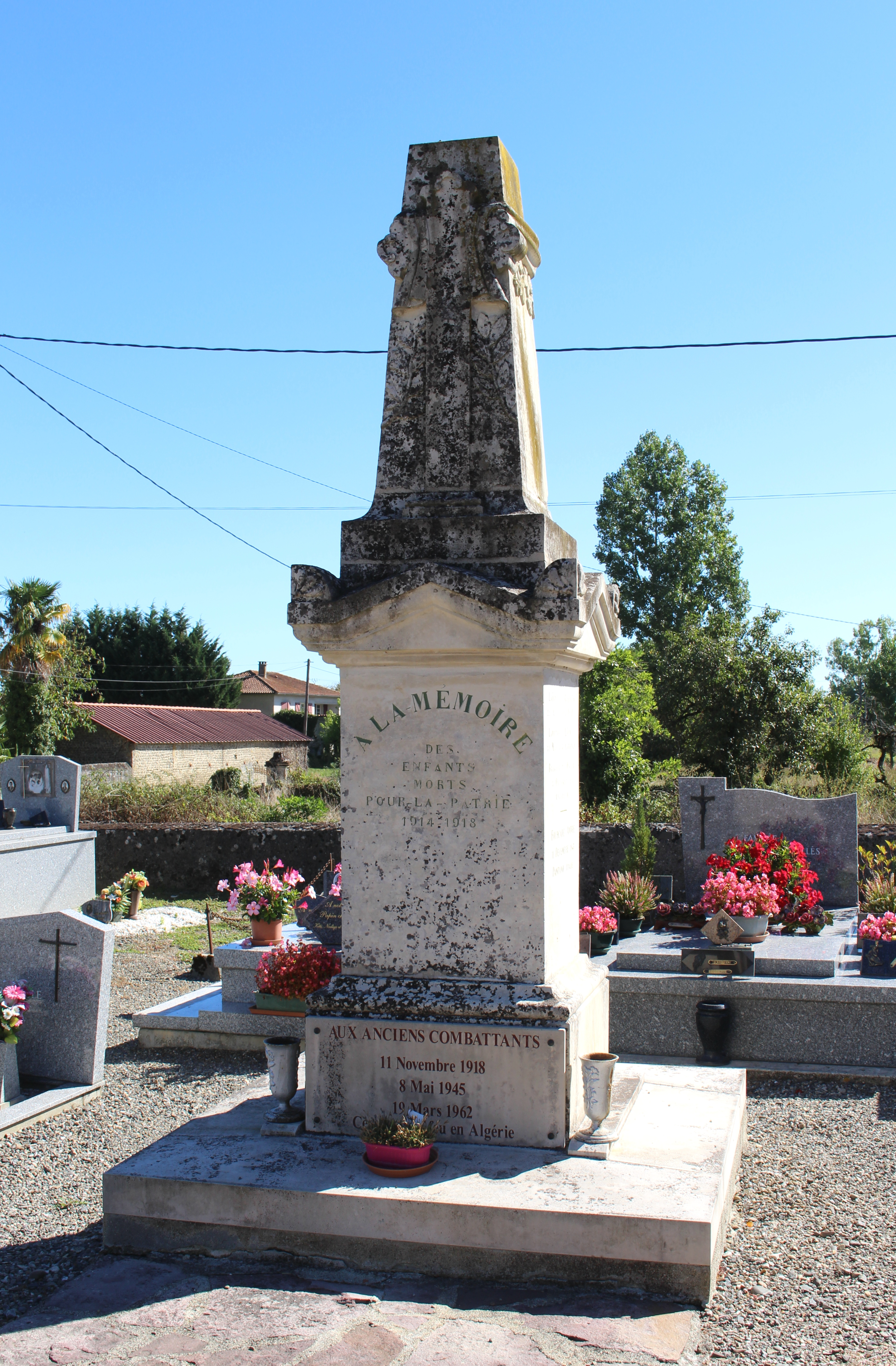 Monument aux morts de Caussade-Rivière (Hautes-Pyrénées)